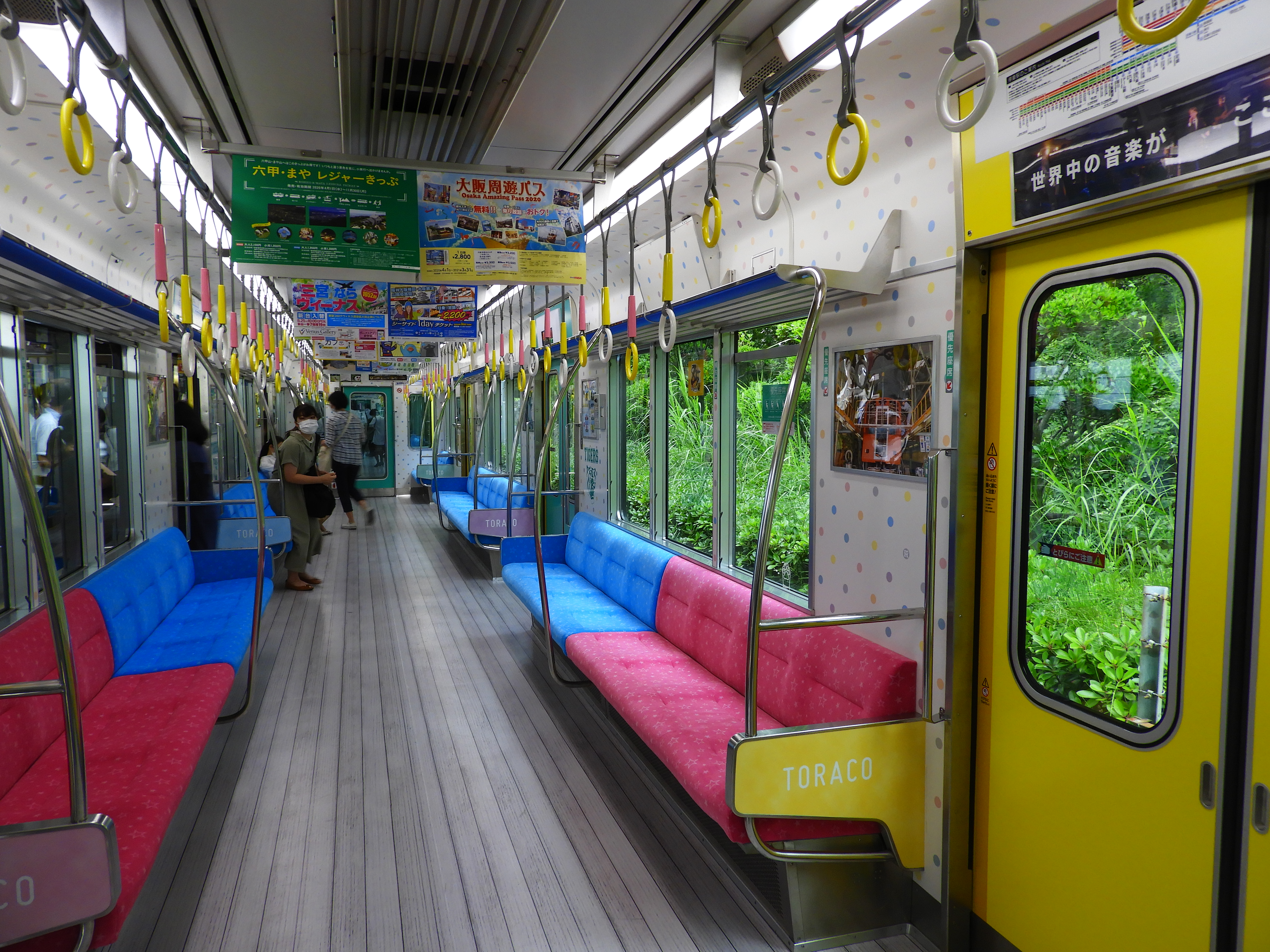 阪神5500系5511F TORACO号車内 Nikon Coolpix B700